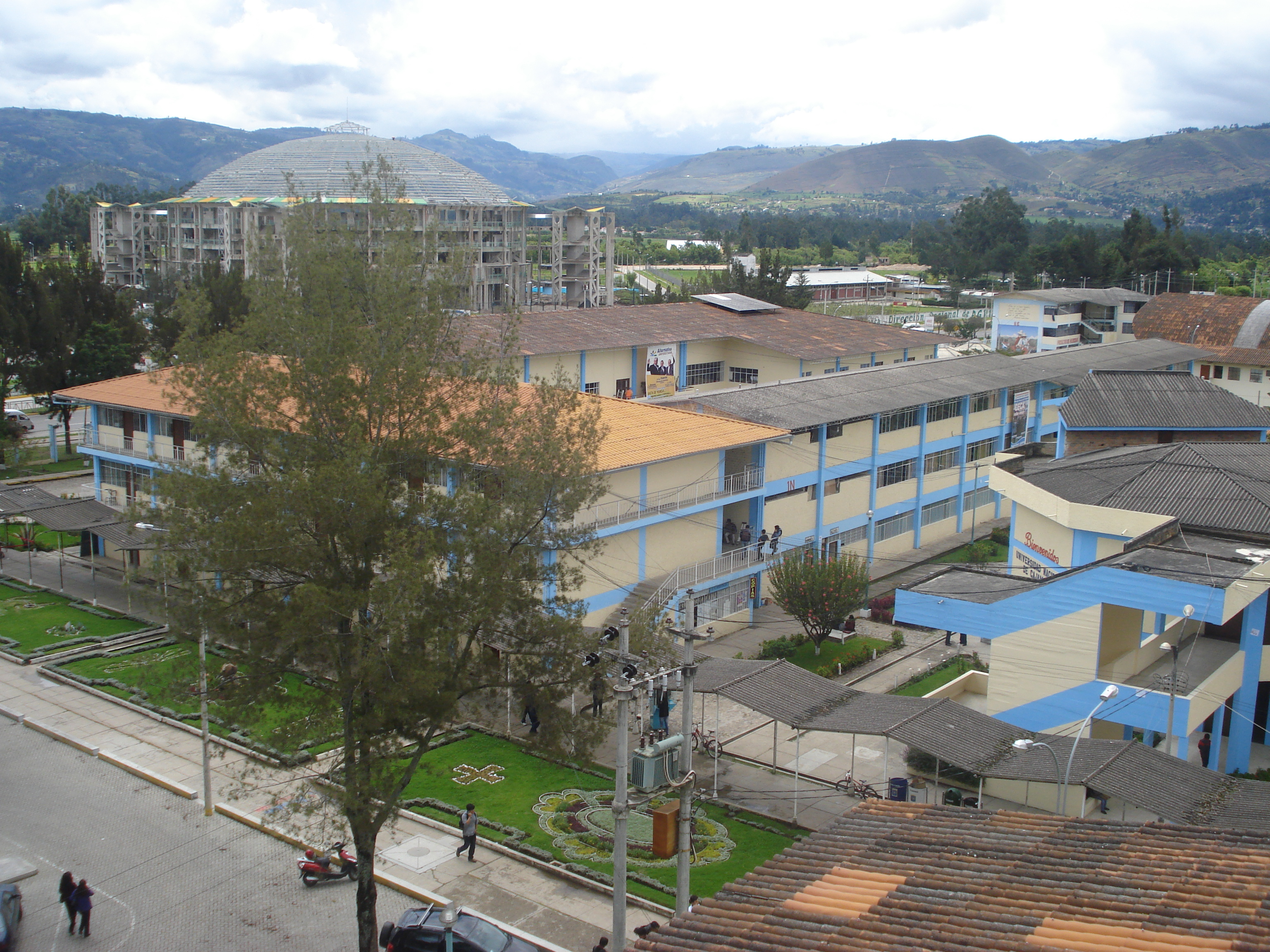 Edificios de CECA, y en la parte de atrás puede observarse el coliseo multiusos - UNC - Cajamarca